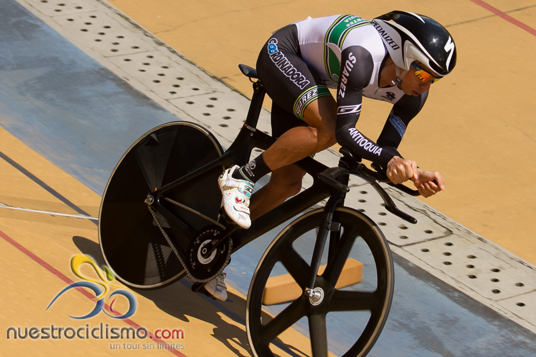 Viernes 18 de octubre de 2013 Persecución Individual Varones Velódromo Martín Emilio Cochise (Medellín) Campeonato Nacional de Pista 2013 Foto: ©